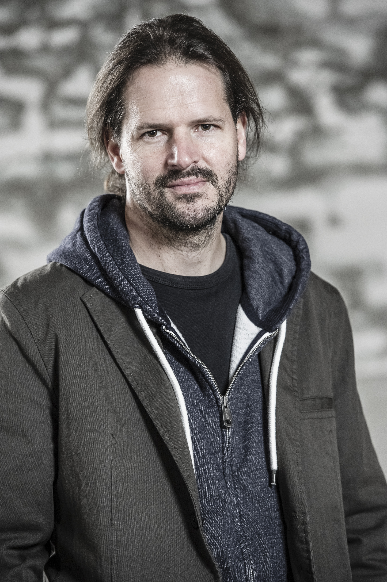 Portrait von Arne Ulbricht, Lizenz: CC-BY 4.0